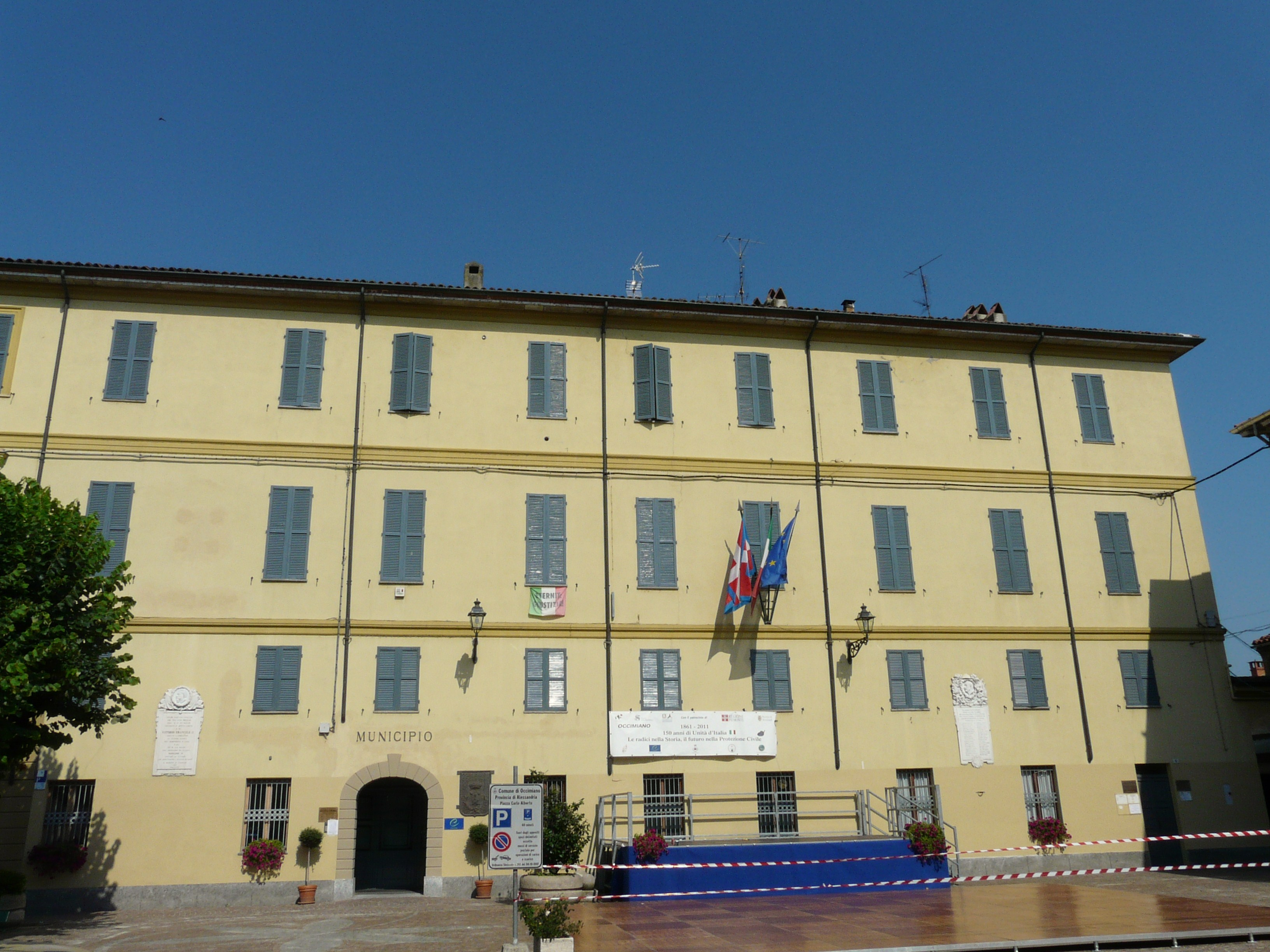 Municipio, Occimiano, Piemonte, Italia